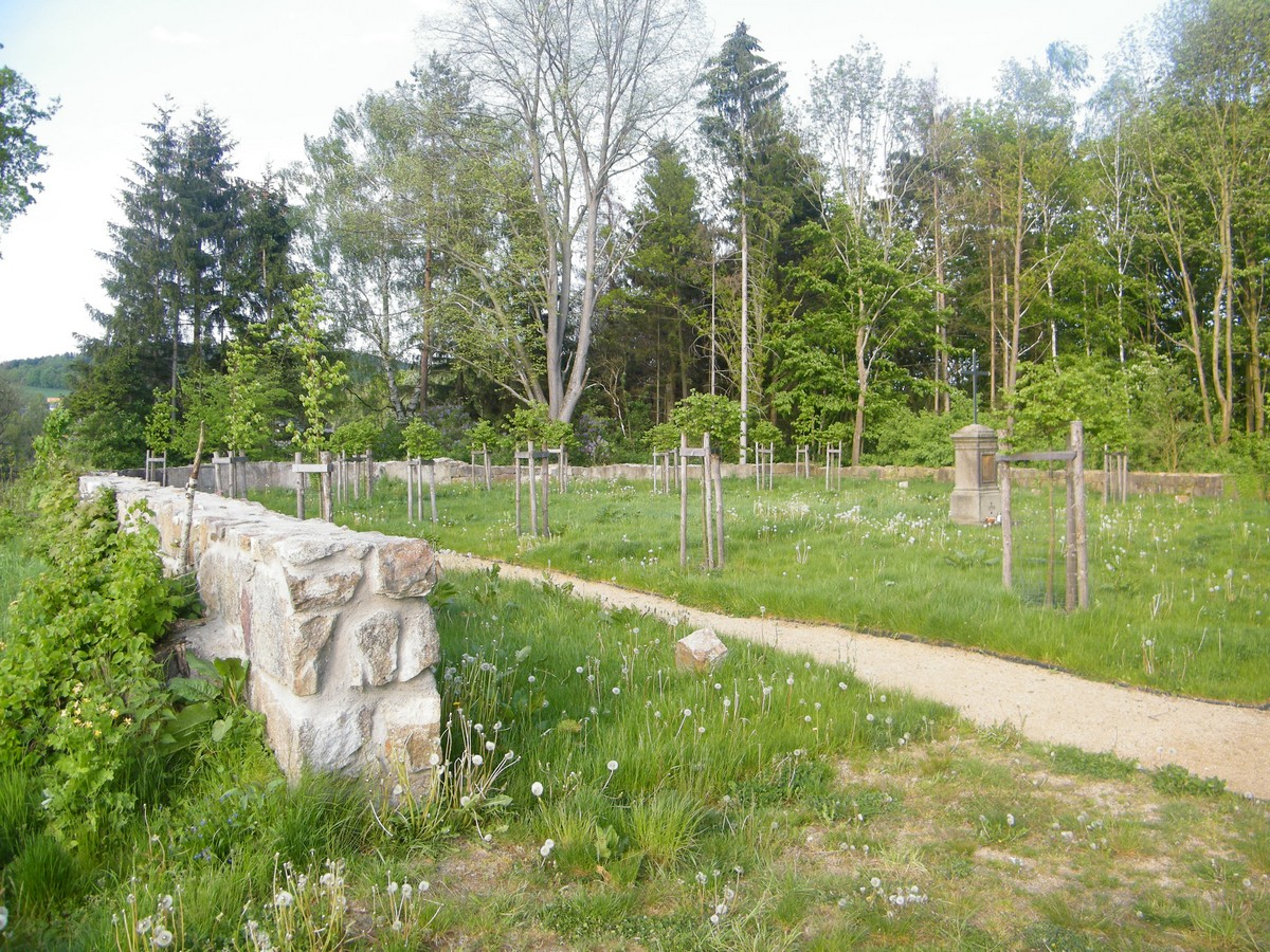 Fukovský hřbitov